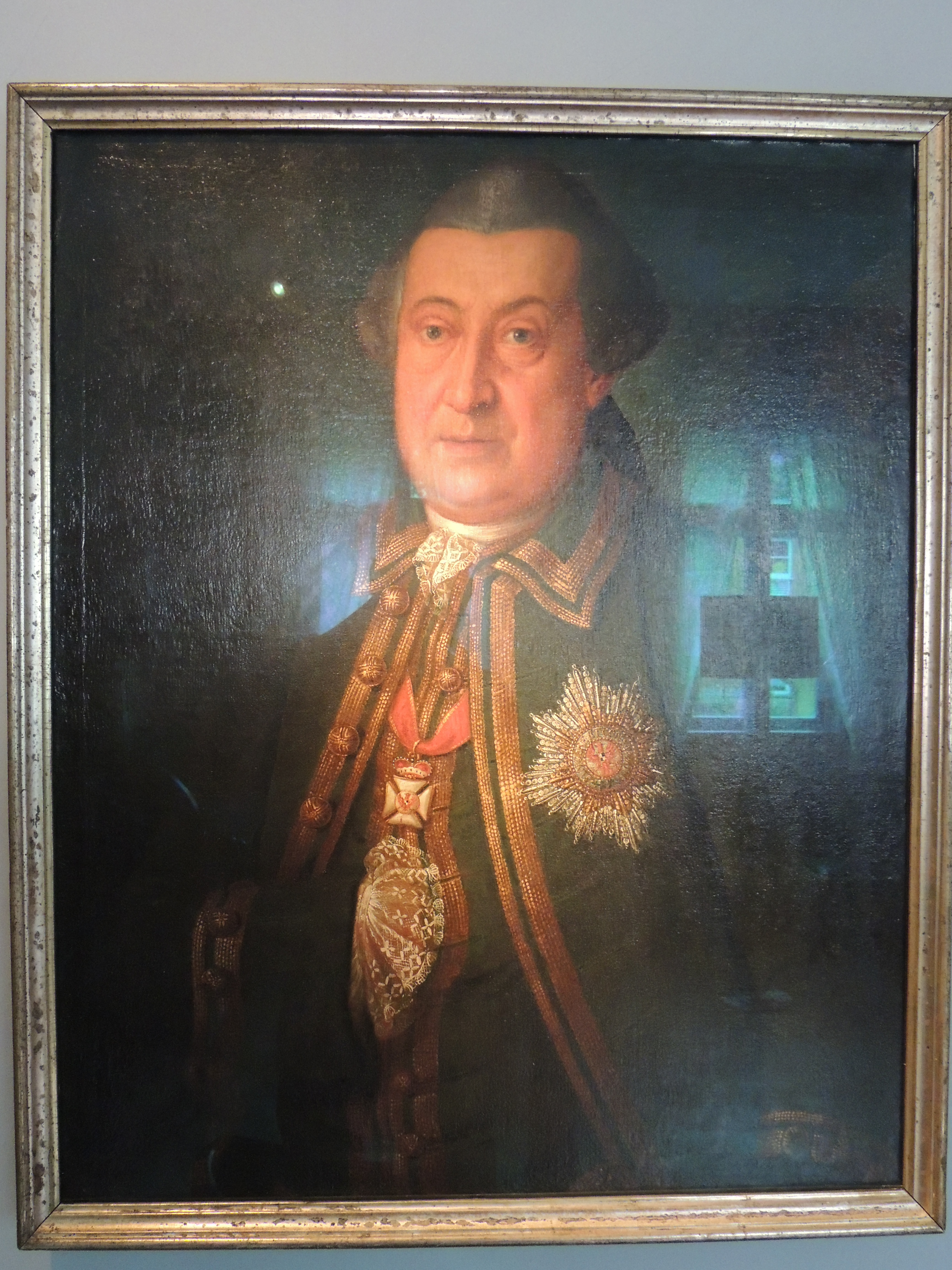 Porträt Carl Christoph von Lengenfeld gemalt von Friedrich Wilhelm Christoph Morgenstern; ausgestellt im Schillerhaus Rudolstadt